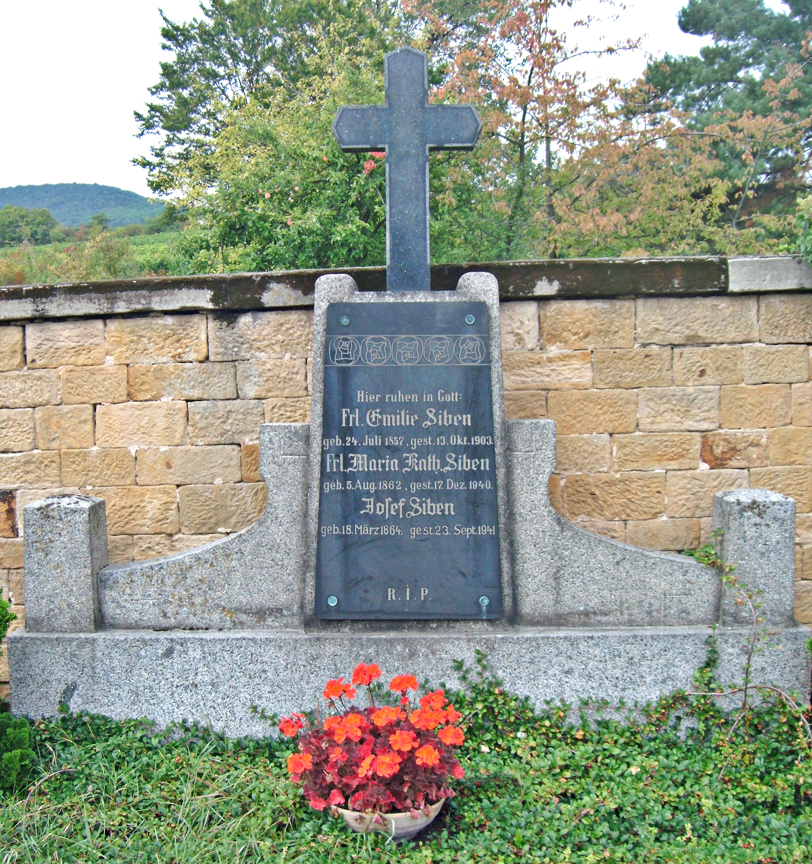 Friedhof Deidesheim, Grab Josef Siben (1864-1941), Bayerischer Landtagsabgeordneter